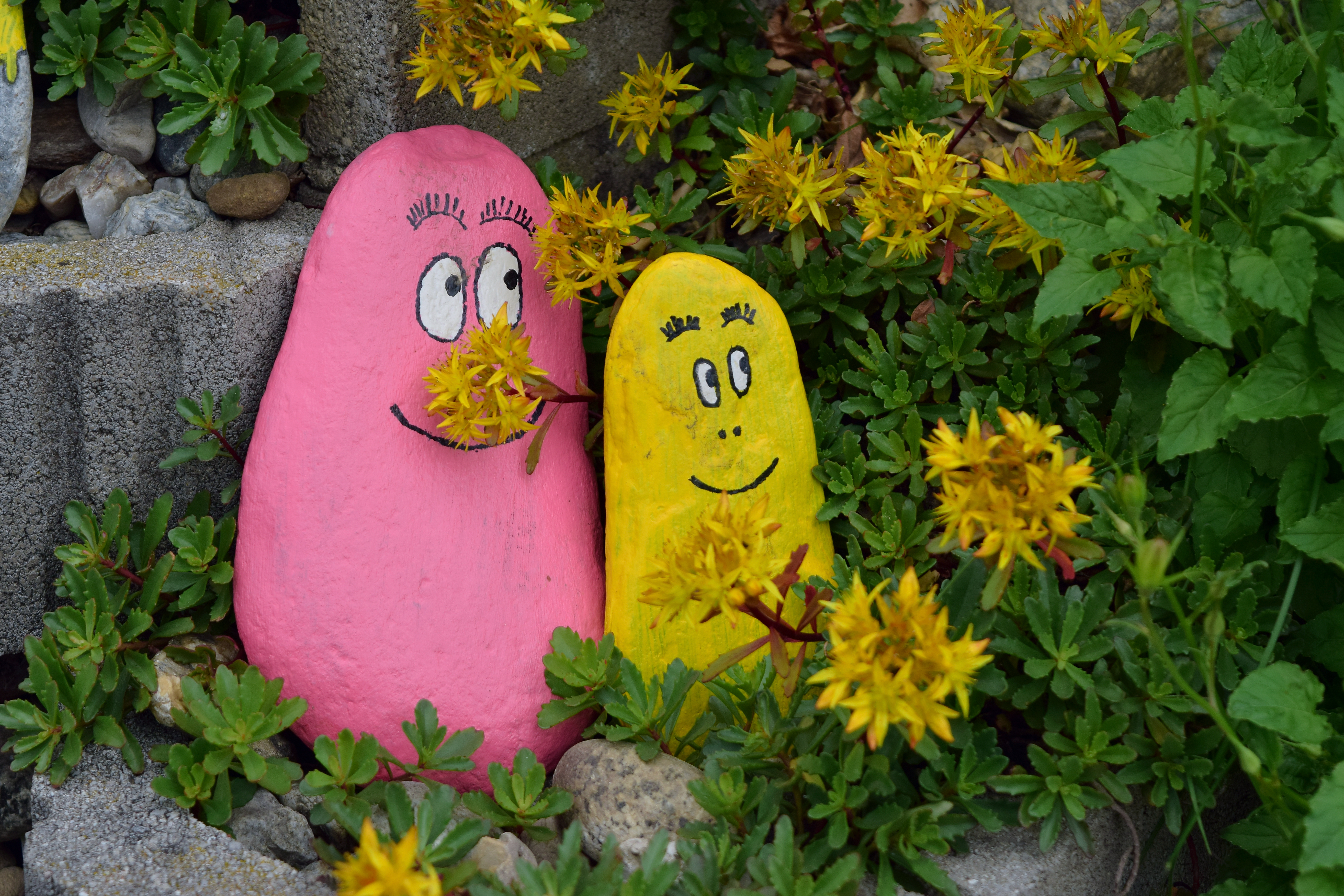 Als Barbapapa und Barbakus bemalte Steine in einem Pflanzstein. Gefunden in Matrei in Osttirol.